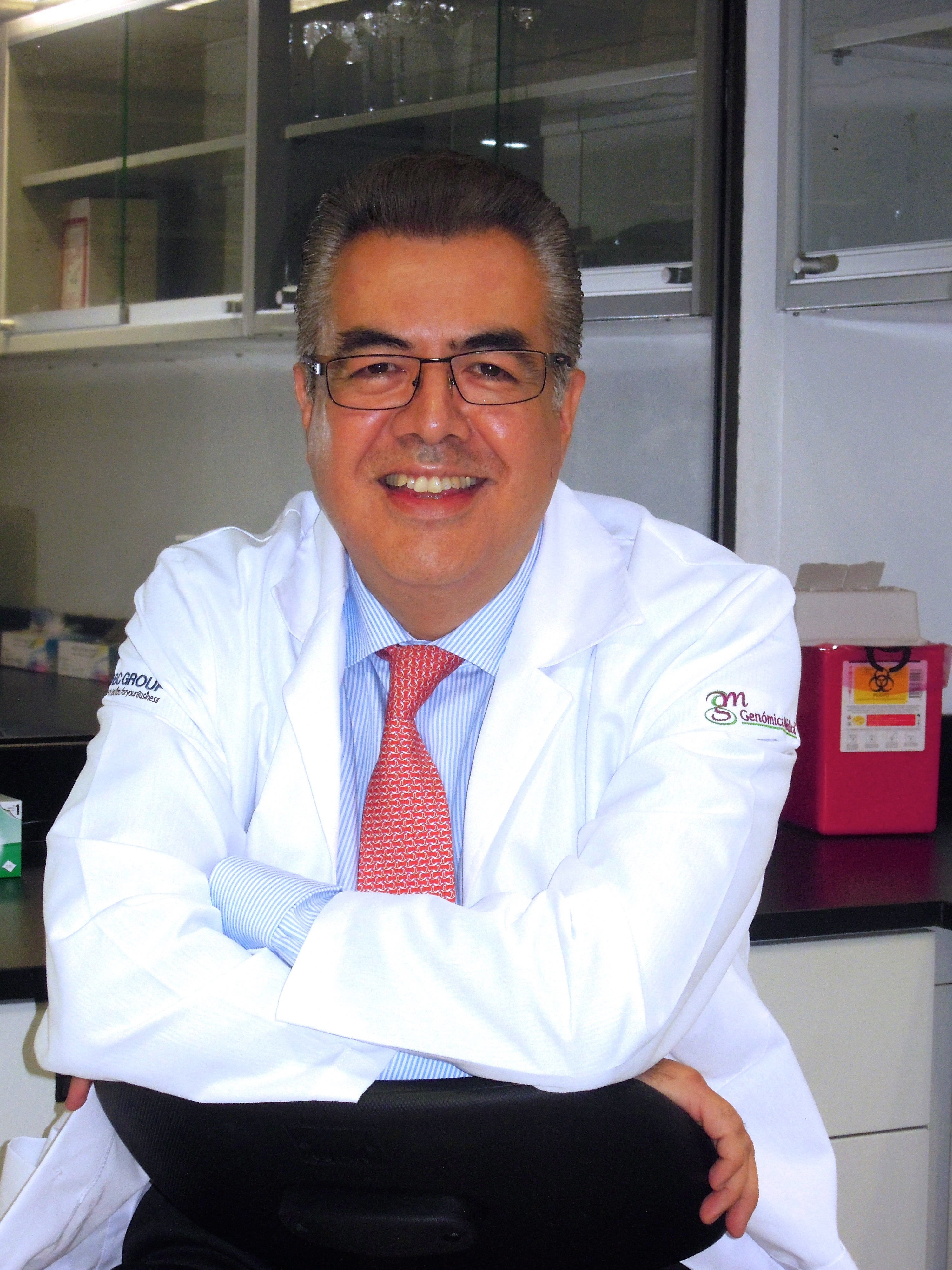 El médico, científico y genomista mexicano Gerardo Jiménez Sánchez en Genómica Médica